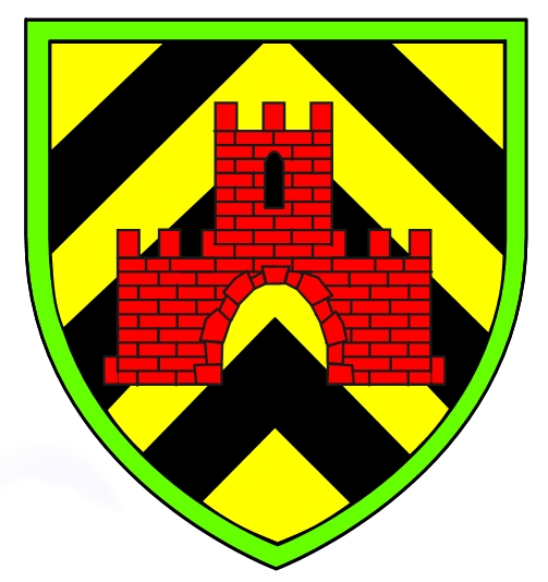 Blason légèrement modifié par moi même sur demande de la Mairie dont je suis Conseiller